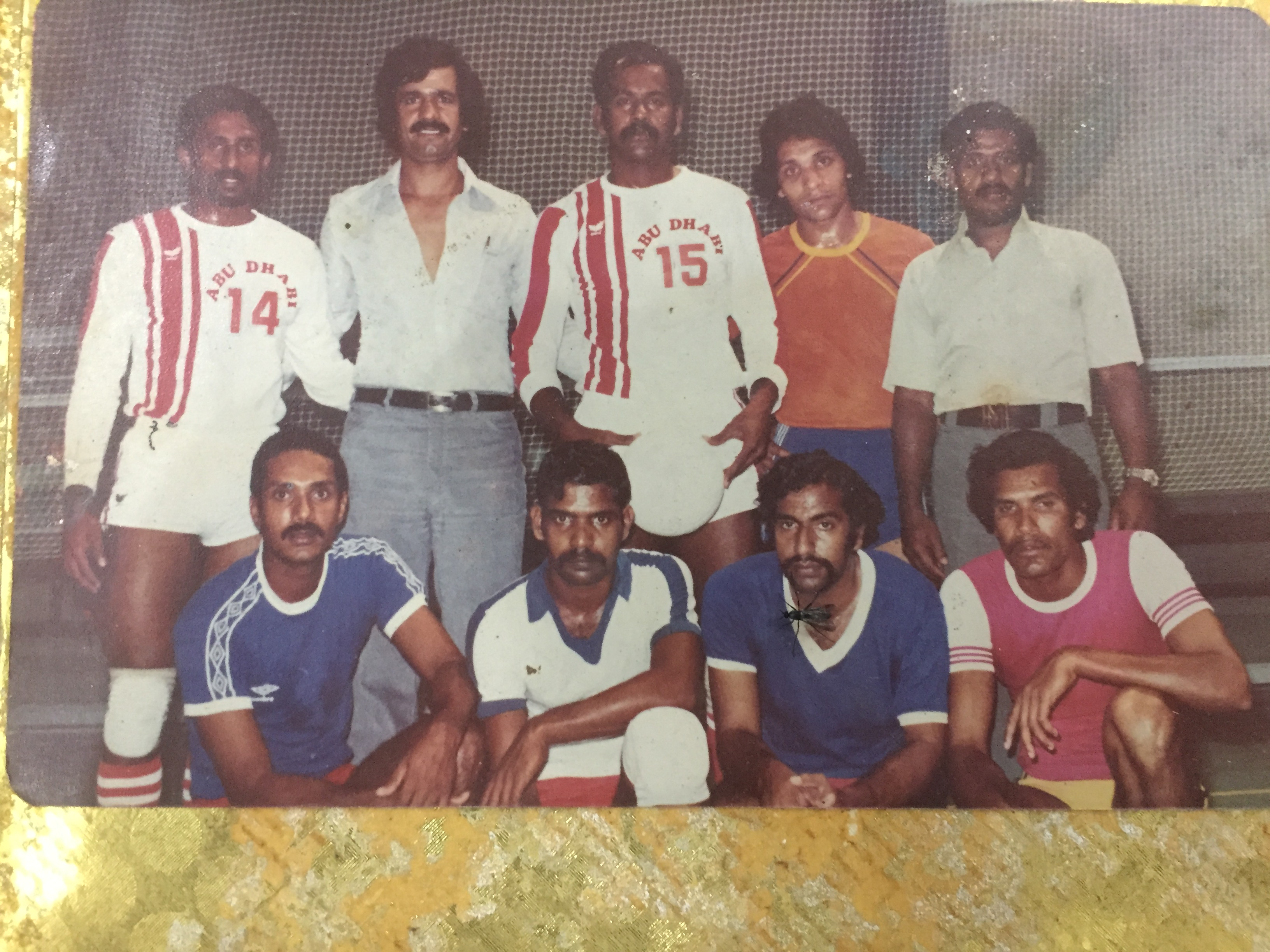 മാണി സി കാപ്പൻ അബുദാബി ടീമിനൊപ്പം